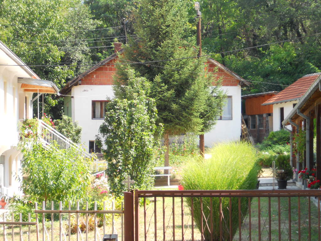 Srpski (latinica): Vila "Persida"u Manastiru Svete Bogorodice Sićevo, Niš, Srbija Autor slike dr Milorad Dimić